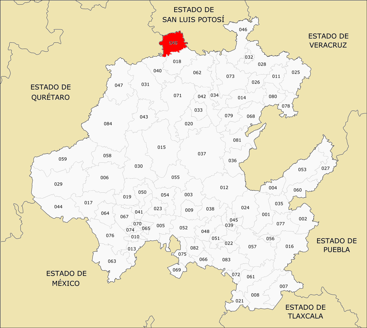 Municipio de Hidalgo